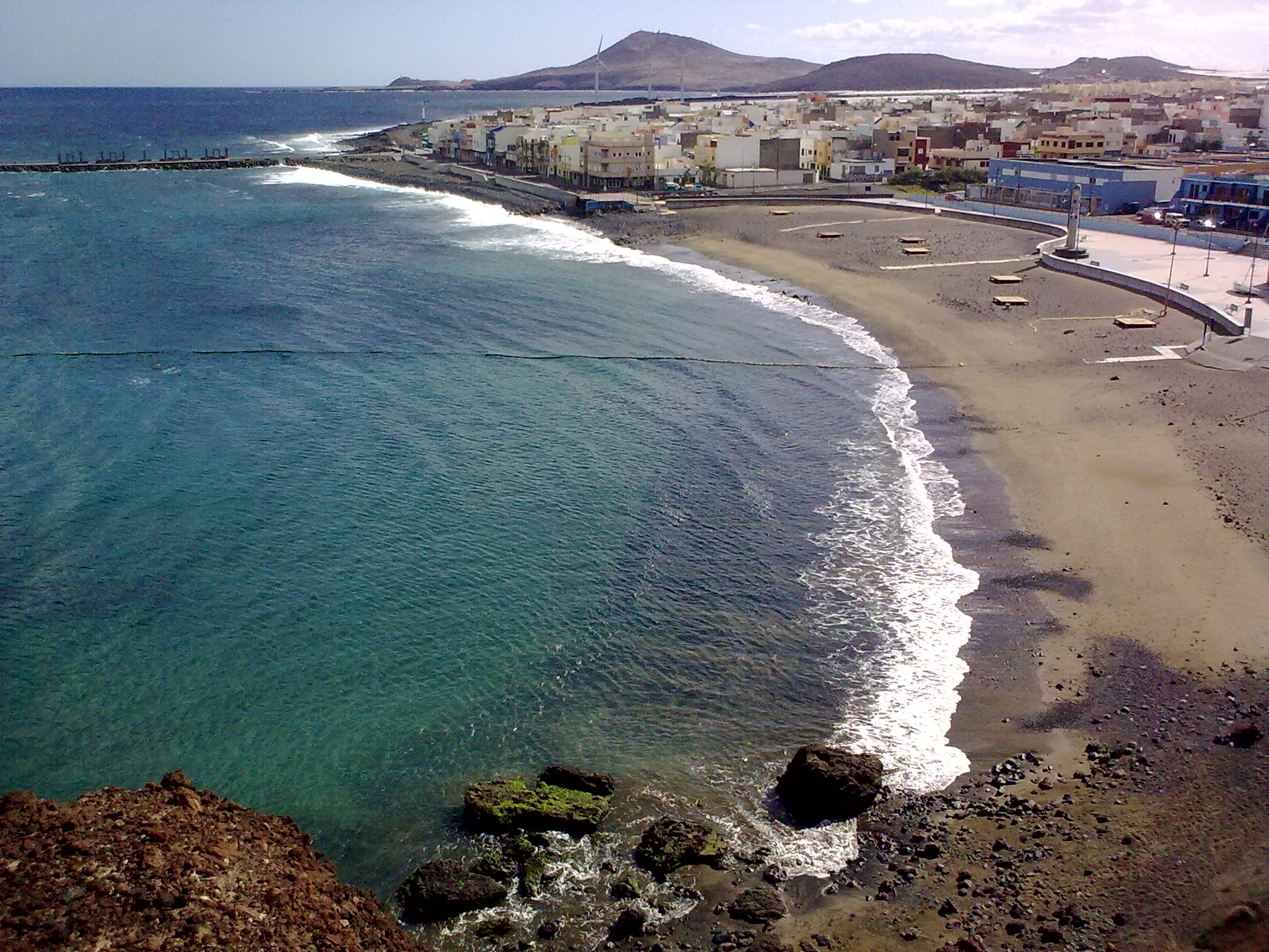 Vista completa de la playa de El Burrero